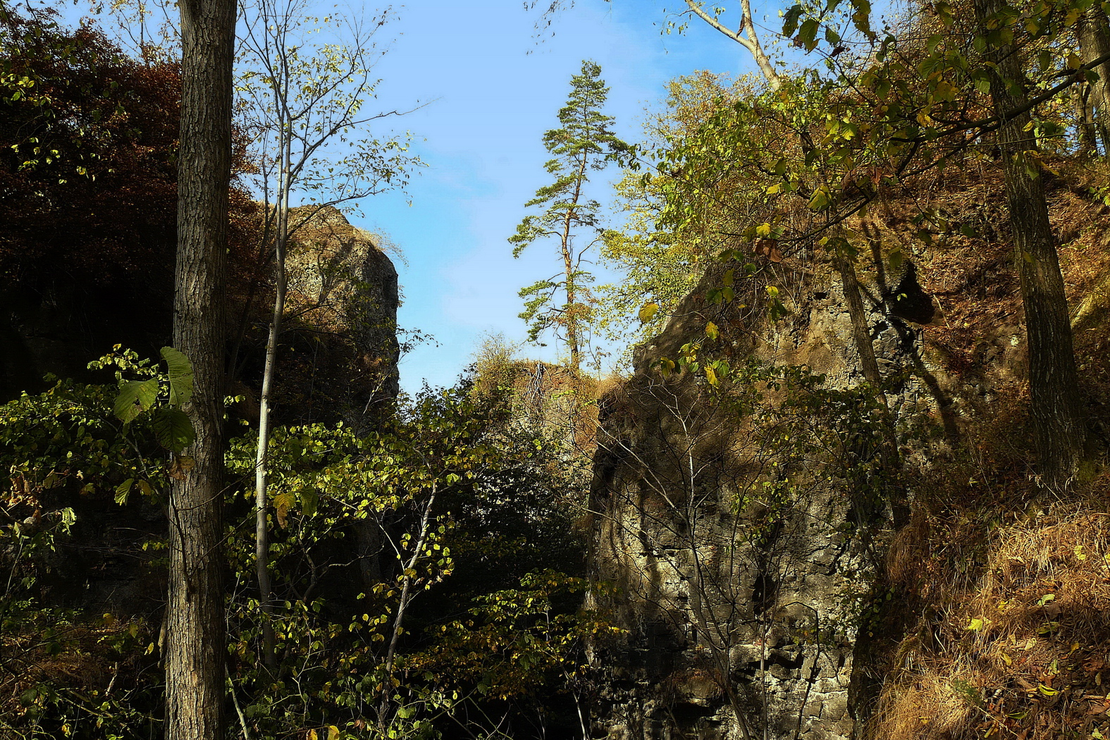 Starý lom čediče na Houseru